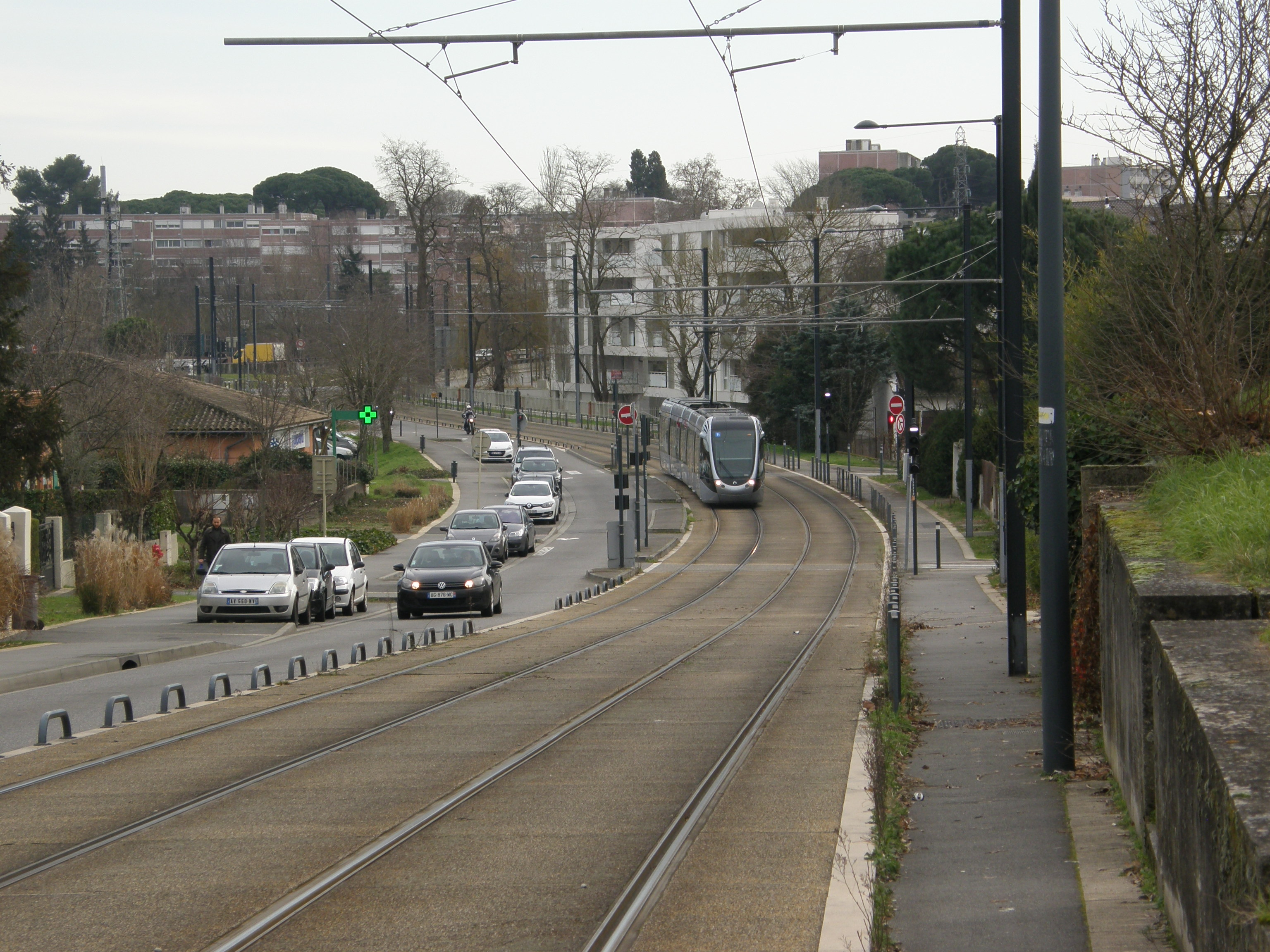 Les voies du T1 vers Toulouse, située sur l'ancienne voie ferrée de Toulouse-Roquet à Cadours.